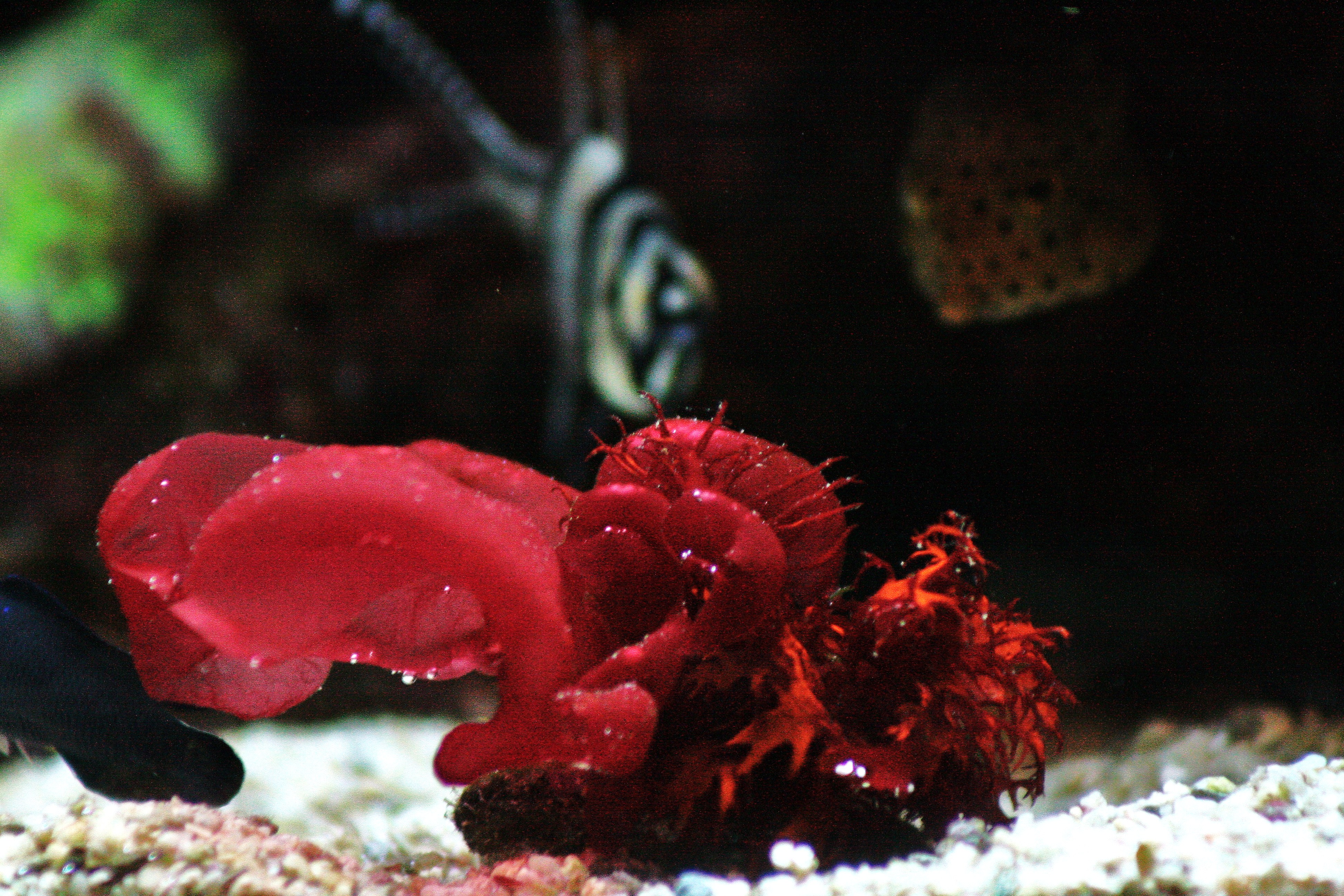 Porphyra (fases haploide y diploide) en acuario de arrecife